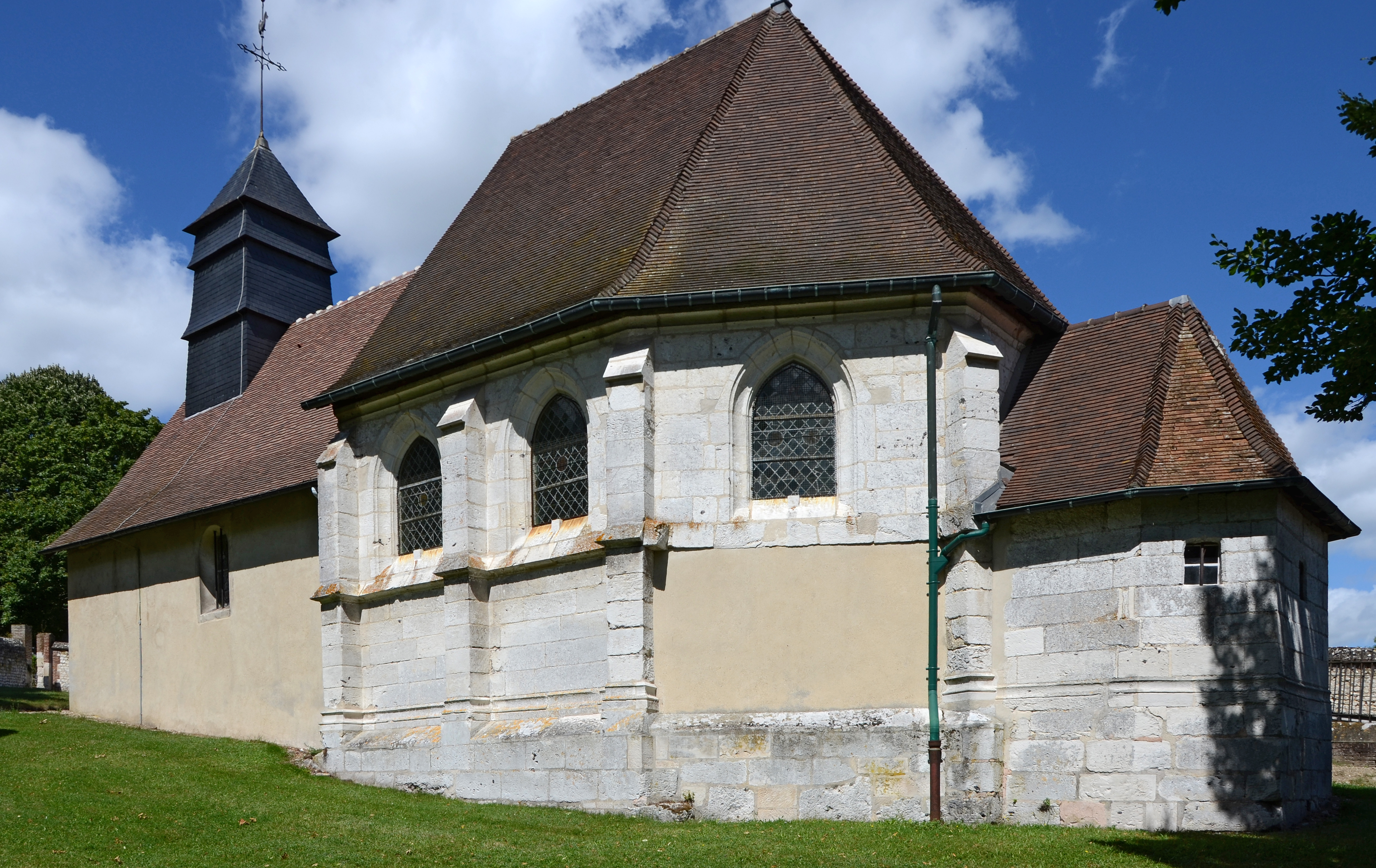 Église Saint-Antoine et Saint-Thibaud de Hautot-sur-Seine, Seine-Maritime, France